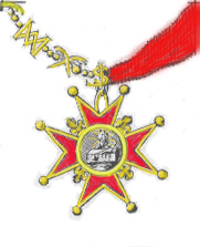 médaille de l'Ordre_royal_et militaire_de_st_Lazard_de Jerusalem_et_hospitalier_de_notre dame_du_mont_Carmel, ici vue de l'avers où figure la Vierge rayonnante d'or; à gauche le collier de grand maitre où s'entremèlent palmes et lettres.